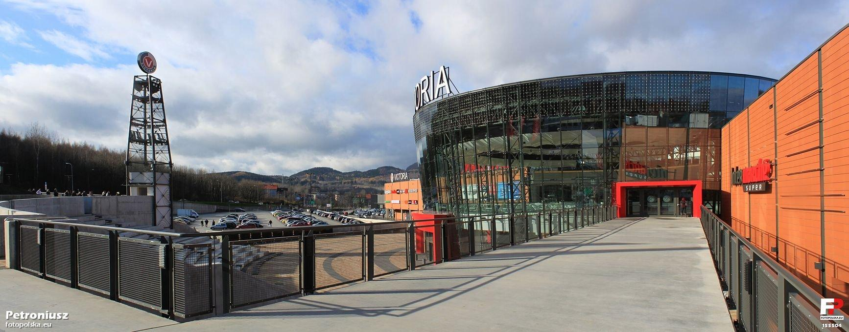 Galeria Victoria w Wałbrzychu. Widok z pasażu (łączącego galerię z ul. 1 Maja) na centralny punkt obiektu - przeszklony "amfiteatr".